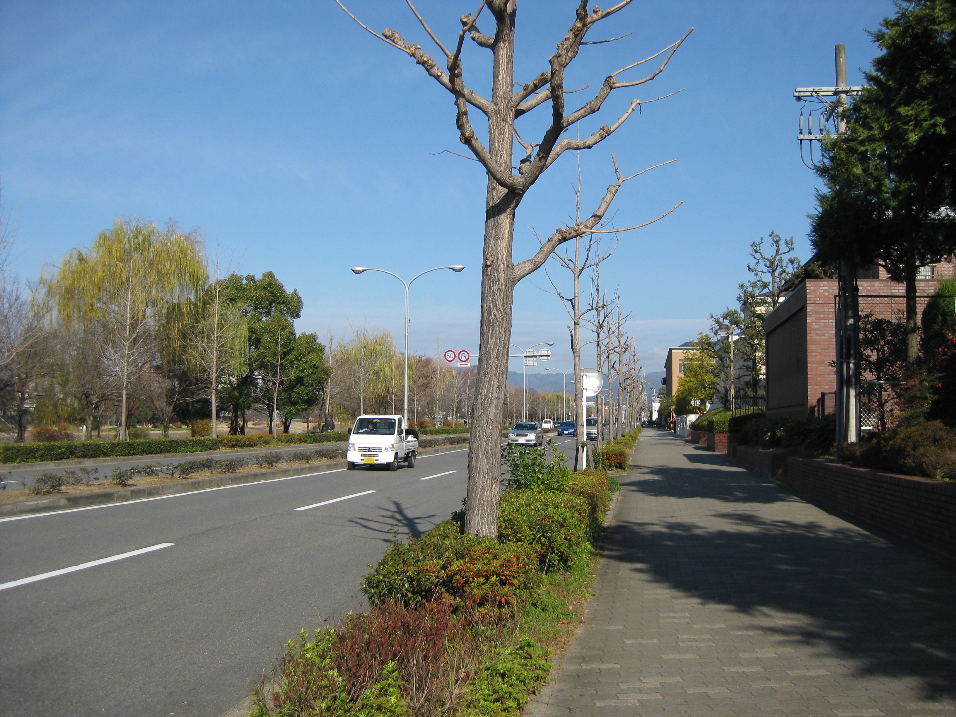 京都市左京区 荒神橋東詰交差点付近より川端通北方向